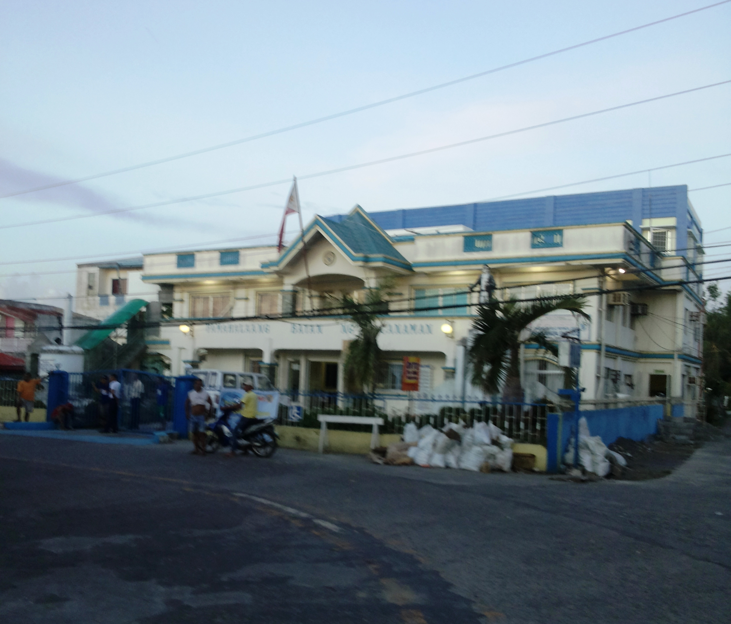 Bikol Central: Munisipyo